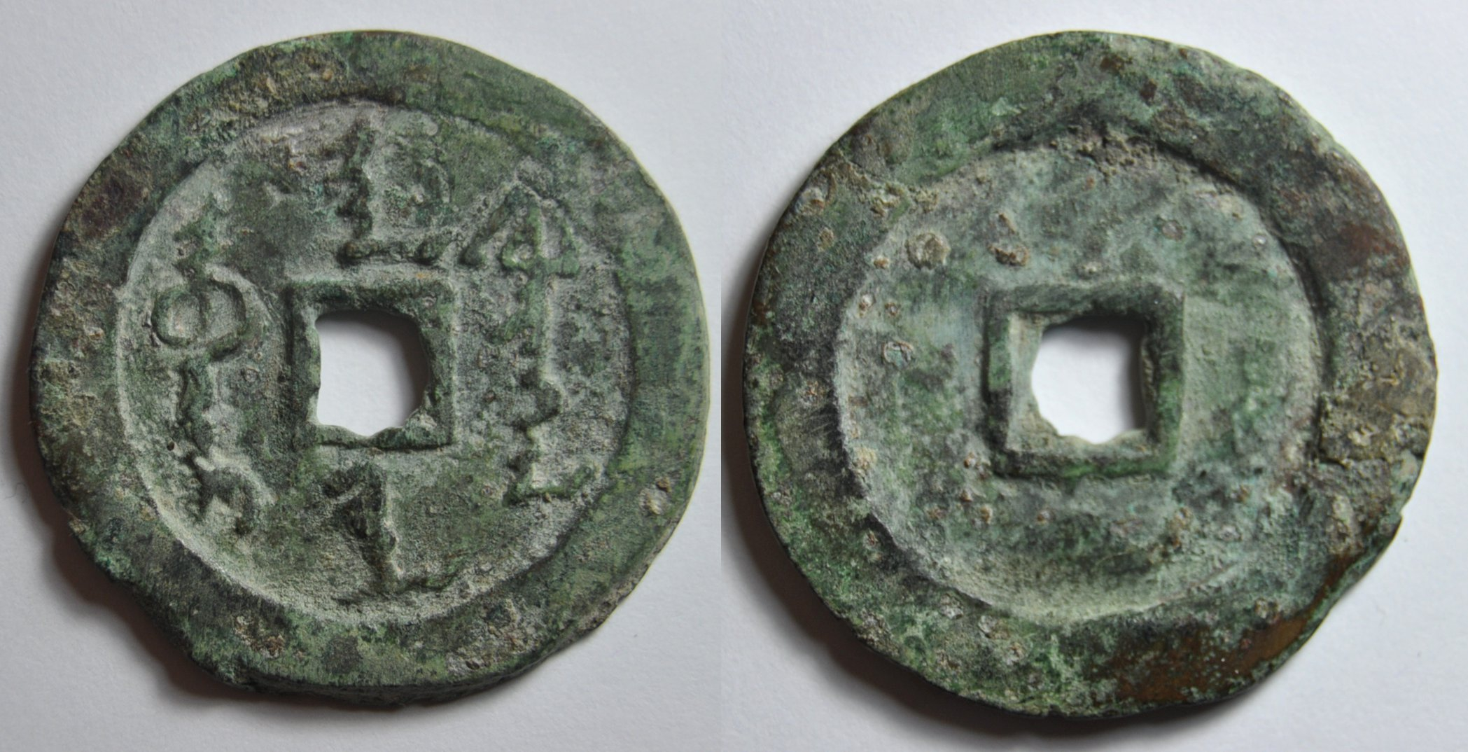 Une monnaie en cuivre de Nurhachi (1559-1626), ère Tian Ming (1616-1626) de la dynastie des Jin (1616-1636), qui deviendra la dynastie Qing (1636-1912) quand les Mandchous vont conquérir la Chine. A/ Abgai fulinga han jiha (Tian Ming Han Qian en chinois) ce qui signifie "Monnaie impériale du Mandat du ciel" R/ vide Diamètre : 29,5 mm Poids : 6,3 g.(1,6 qian) Remarque : Nurhachi appartient au clan des Gioro des Jurchen qu'il changera en Aisin Gioro en 1612 signifiant or d'où le nom de Jin en chinois. Il unit les tribus Jurchen entre 1583 et 1619. En 1599, il demanda la création de l'écriture mandchoue dérivant de l'alphabet mongol. Cet alphabet contient 24 lettres. En 1606, il obtient des Mongols le titre de "Kundulun khan" c'est à dire empereur respecté. Il se proclame khan (roi) en 1616 et sa dynastie prend le nom de Jin en chinois, montrant ainsi qu'elle est le successeur de la dynastie Jin (1115-1234). Il prend le nianhao de Abgai fulinga ou Tian Ming en chinois ce qui signifie "Mandat céleste". Nurhachi meurt en 1626 dans la ville de De-A Man après avoir perdu la bataille de Ningyuan contre la dynastie Ming. Son empire s'étend en Mandchourie et sur une partie de la Chine du Nord. Référence : H22.1, MNIS3696 Indice de rareté : assez commune (R12)